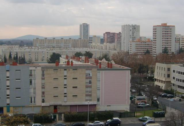 La partie sud du quartier de la Paillade à Montpellier. Photo prise d'un immeuble près de la station de Tramway Saint-Paul. Image perso